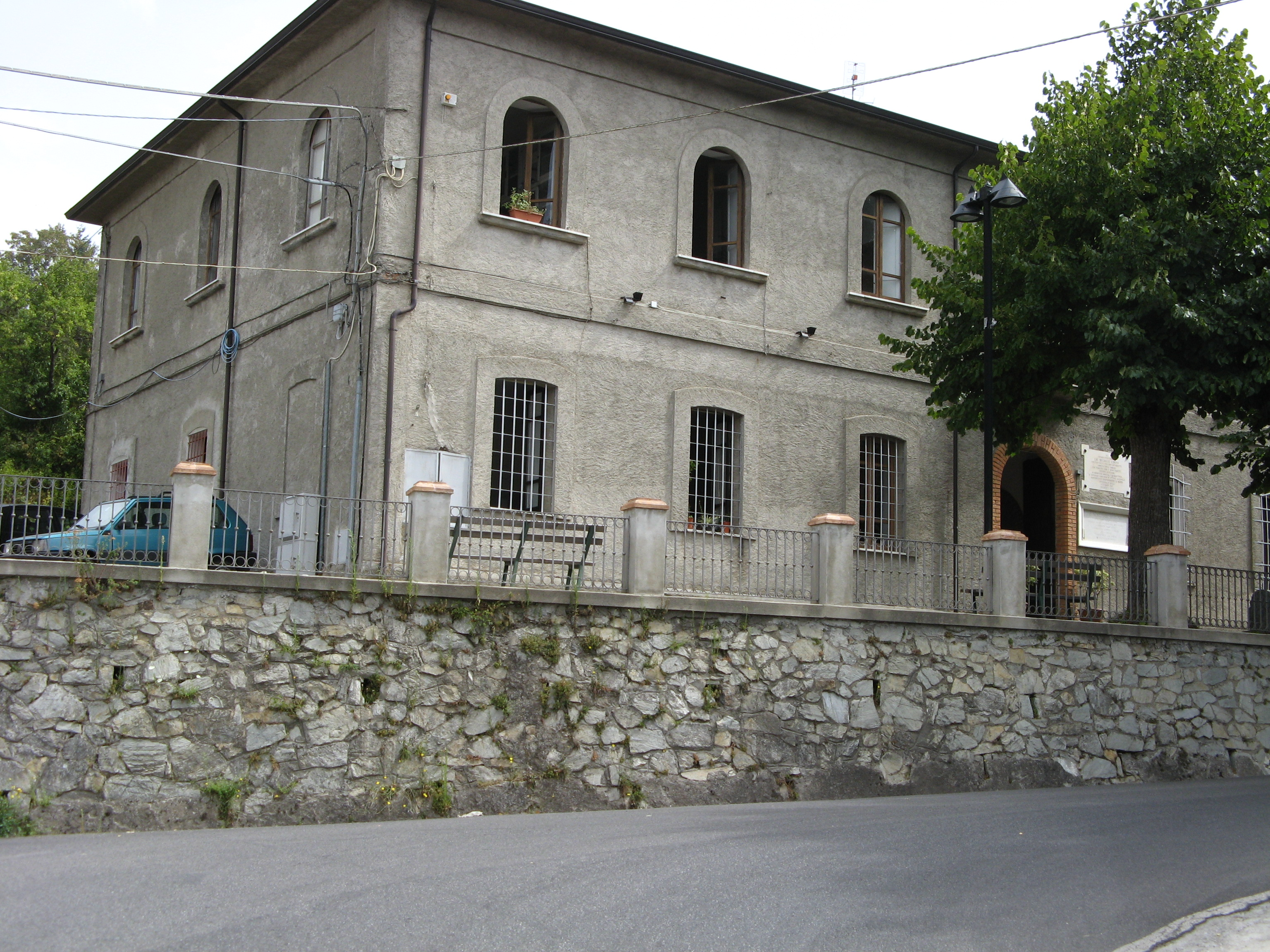 Soveria Mannelli, Palazza Cimino (Palazzo Comunale)